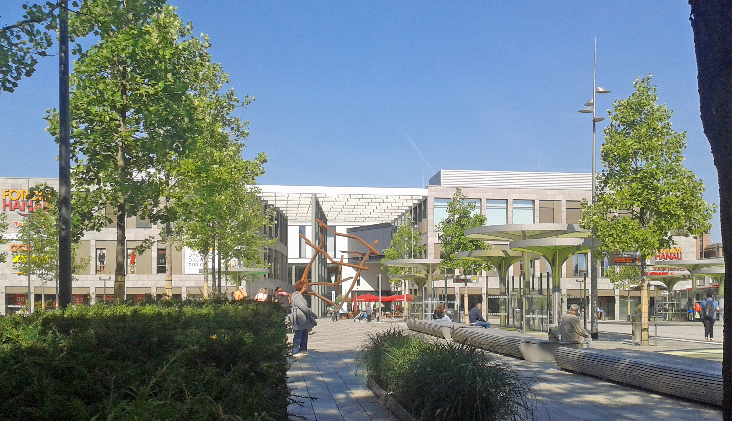 Freiheitsplatz